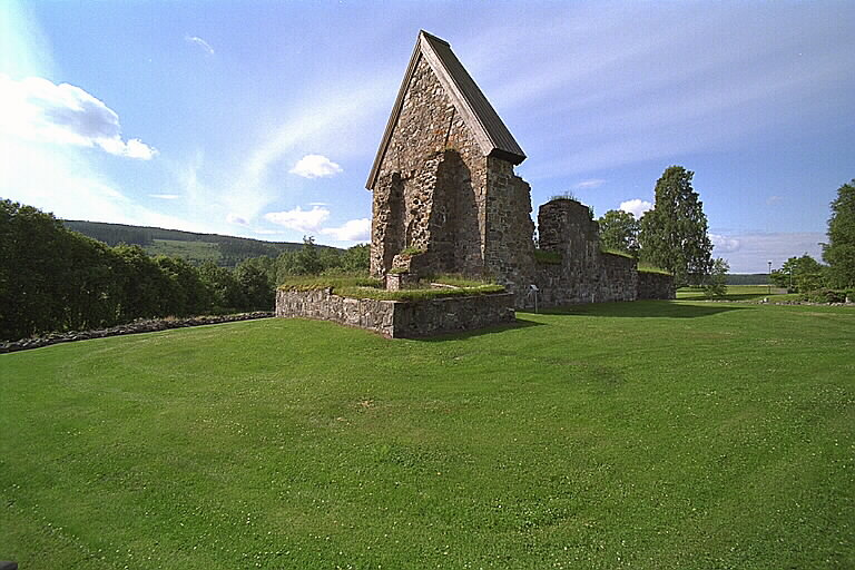 Motiv: Selångers gamla kyrka Kategori: Kyrka/kapell .